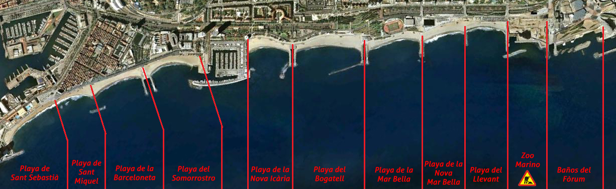 Playas de Barcelona